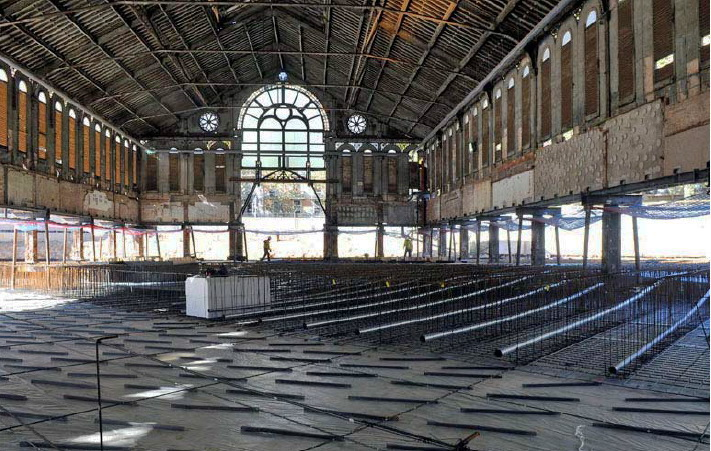 Remodelació del Mercat de Sant Antoni (Barcelona). Fase de Construcció de la llosa de formigó sota l'antiga estructura del mercat.